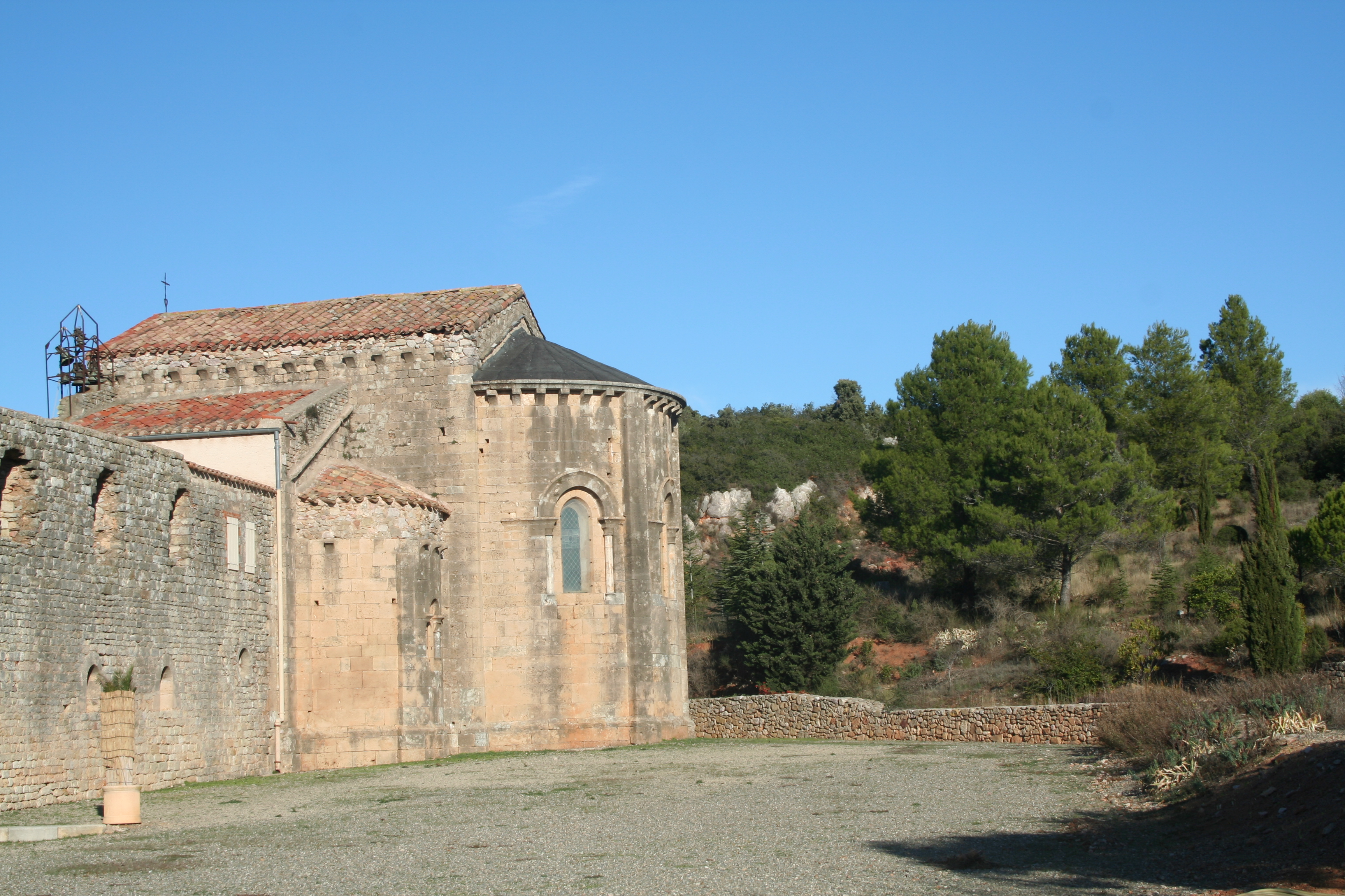 Cazedarnes (Hérault) - Abbaye de Fontcaude - chevet de l'église.